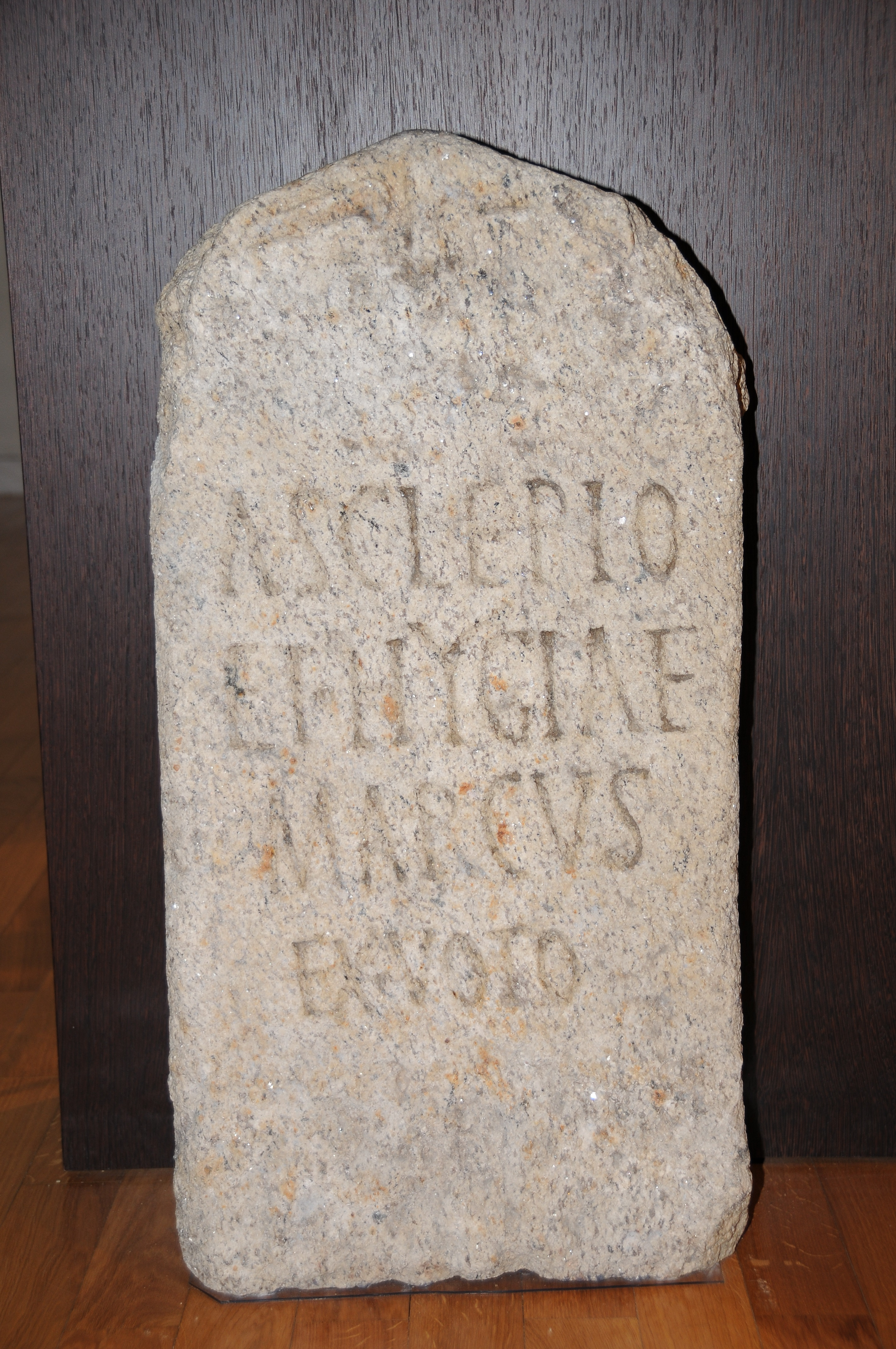 Ancient Roman inscription in D. Diogo de Sousa Museum, Braga, Portugal